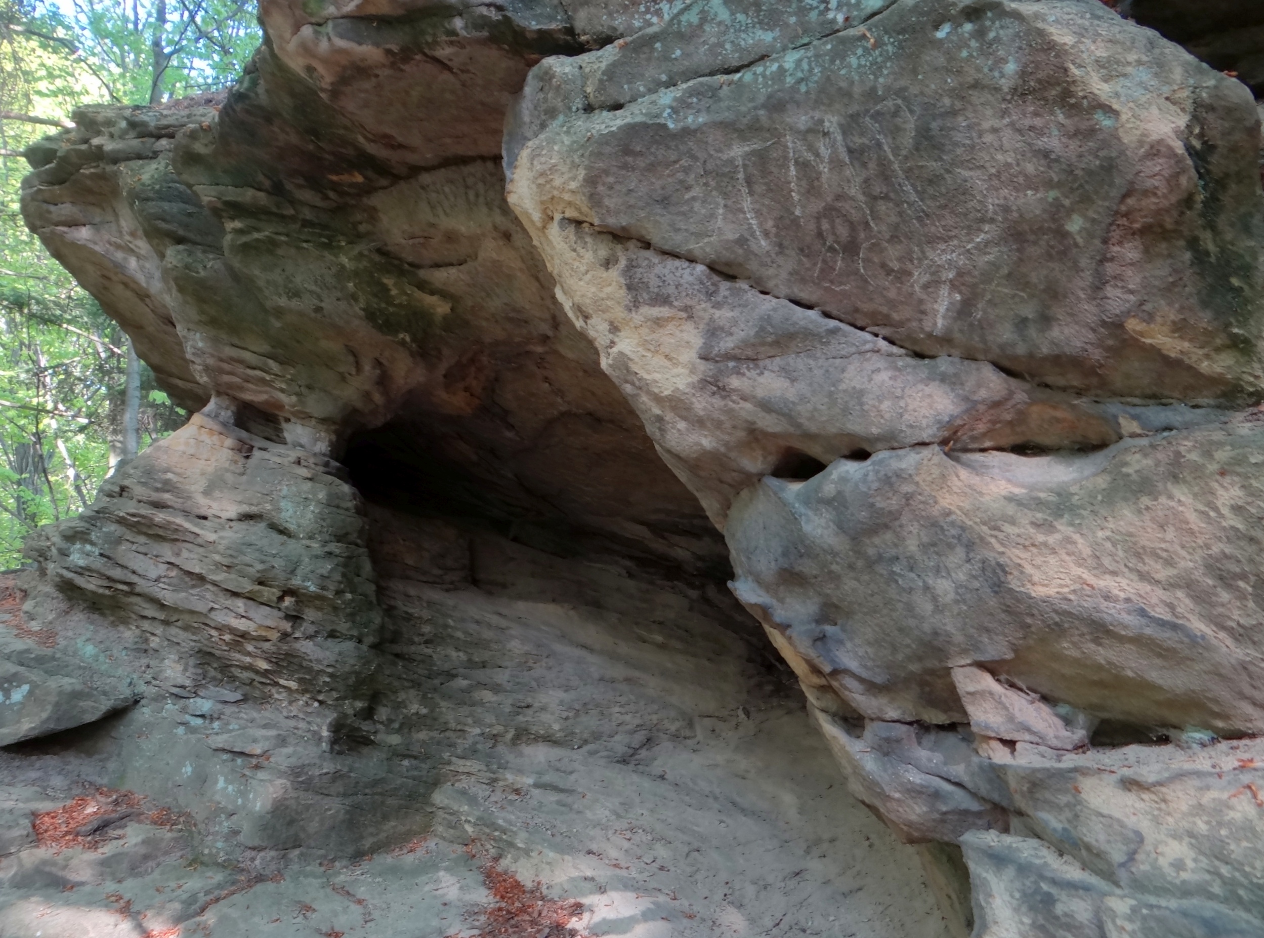 Schronisko w Grzybku